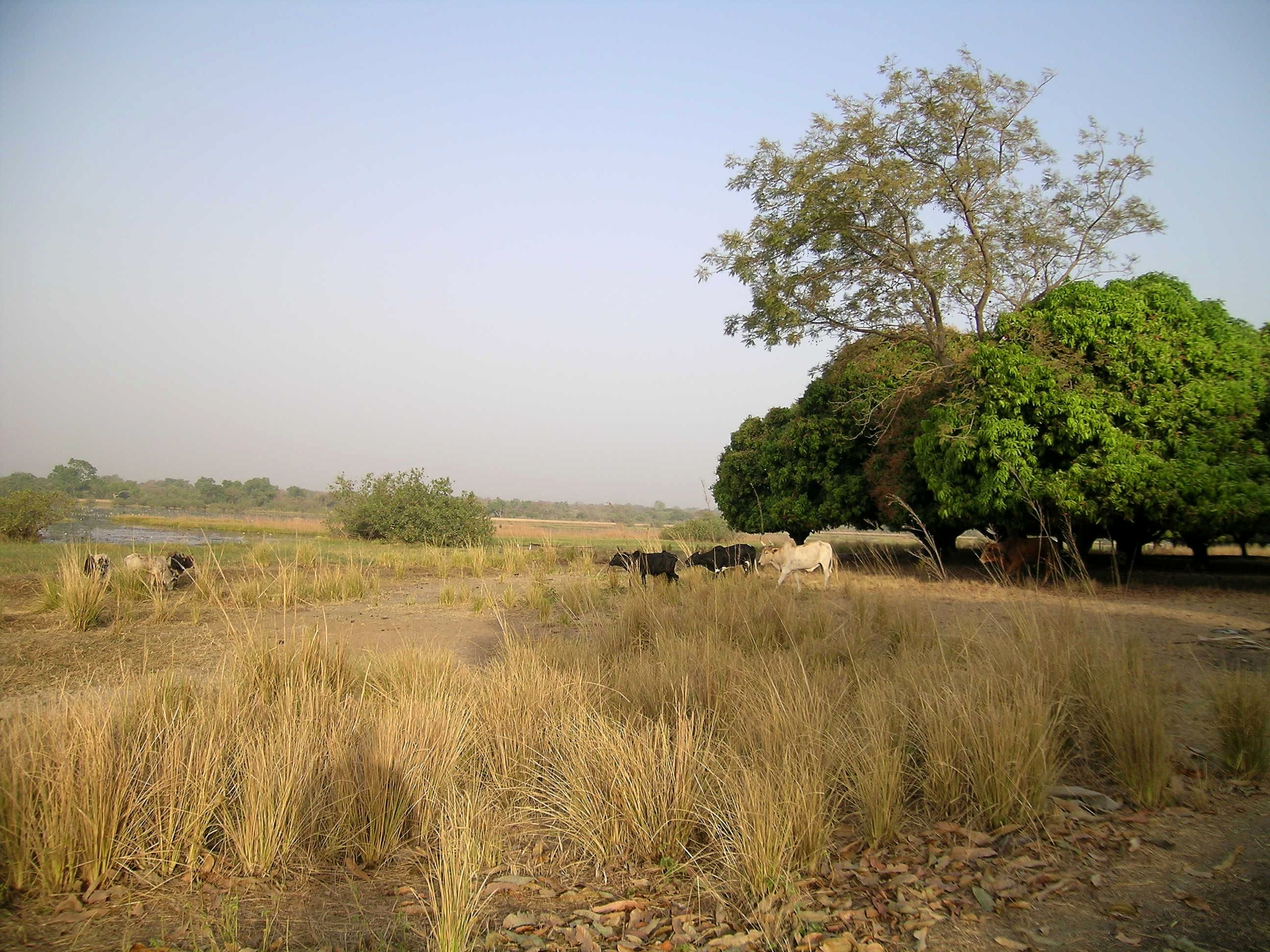 Lake in Tengrela, Burkina Faso